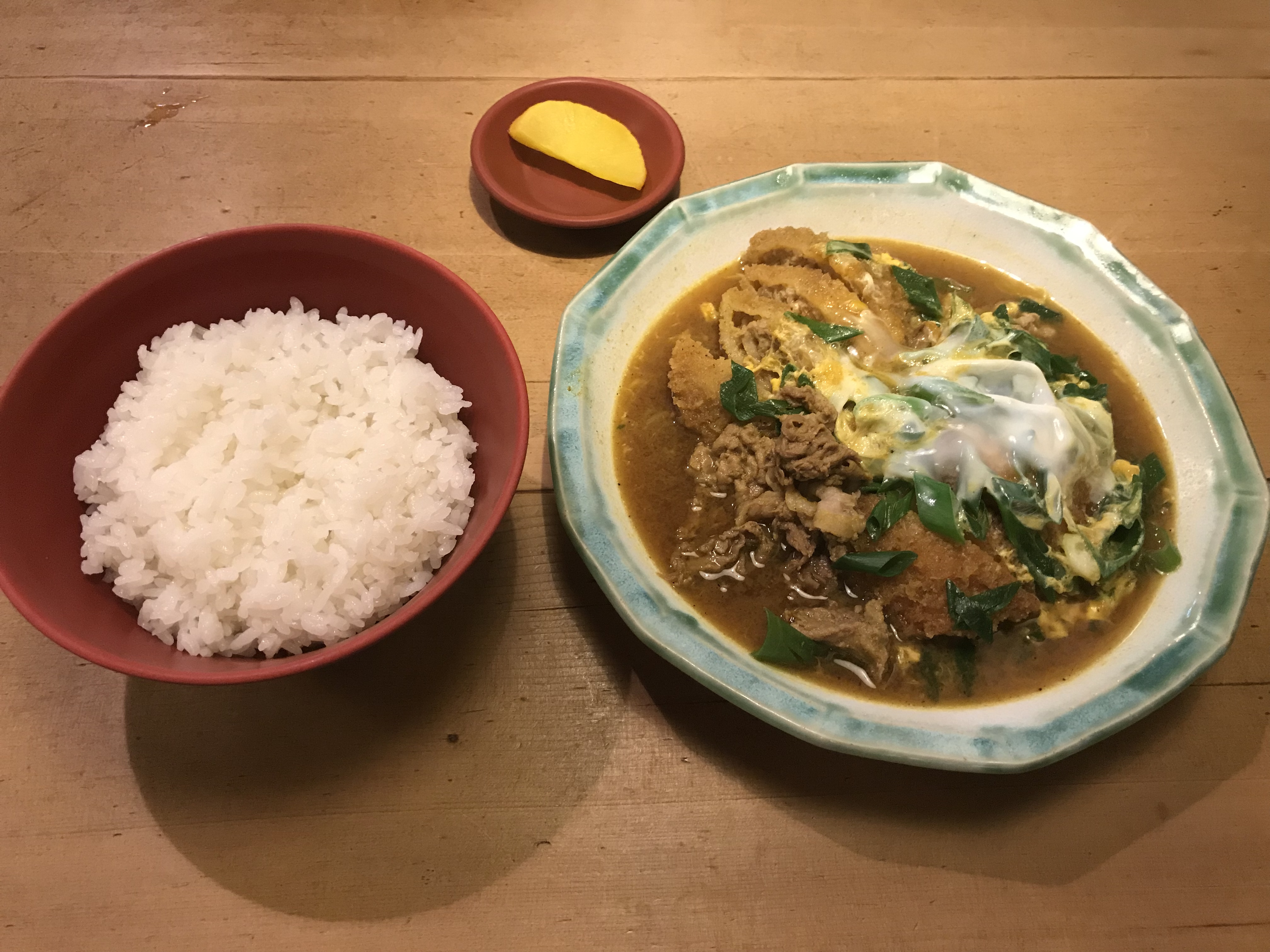 カレー味のカツとじ。大阪府高槻市にて